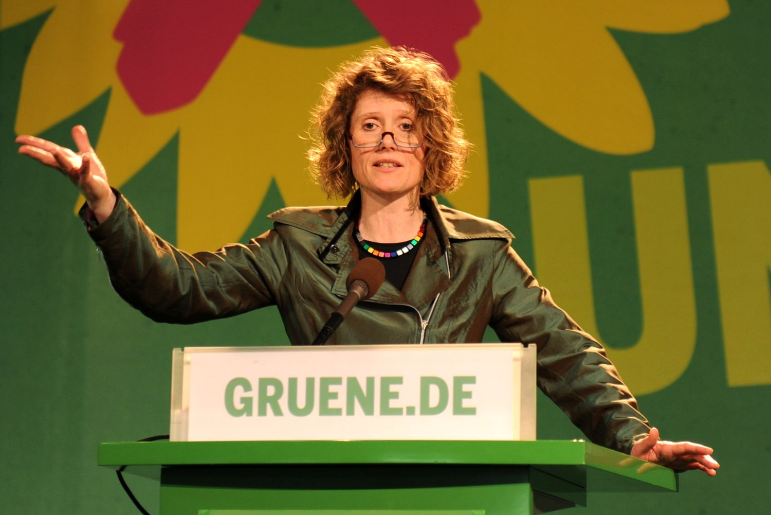 Eveline Lemke bei einer Tagung des Länderrats von Bündnis 90/Die Grünen in der Alten Lokhalle in Mainz